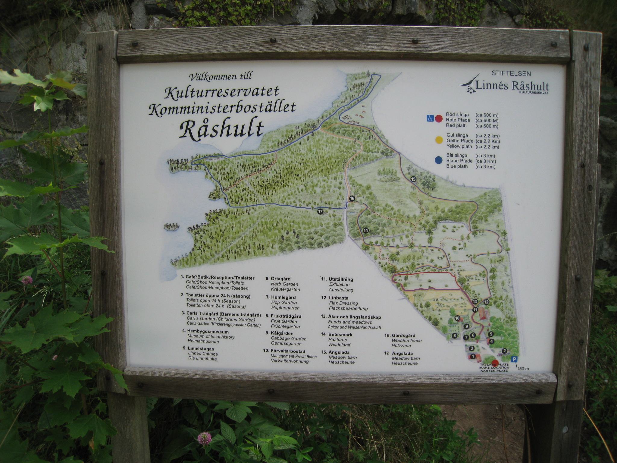 Linnés Råshult, informationsskylt om kulturreservatet. Gården Råshult i Stenbrohults socken i Småland är känt som Carl von Linnés hembygd. Stenbrohults socken ingick i Allbo härad i Värend.